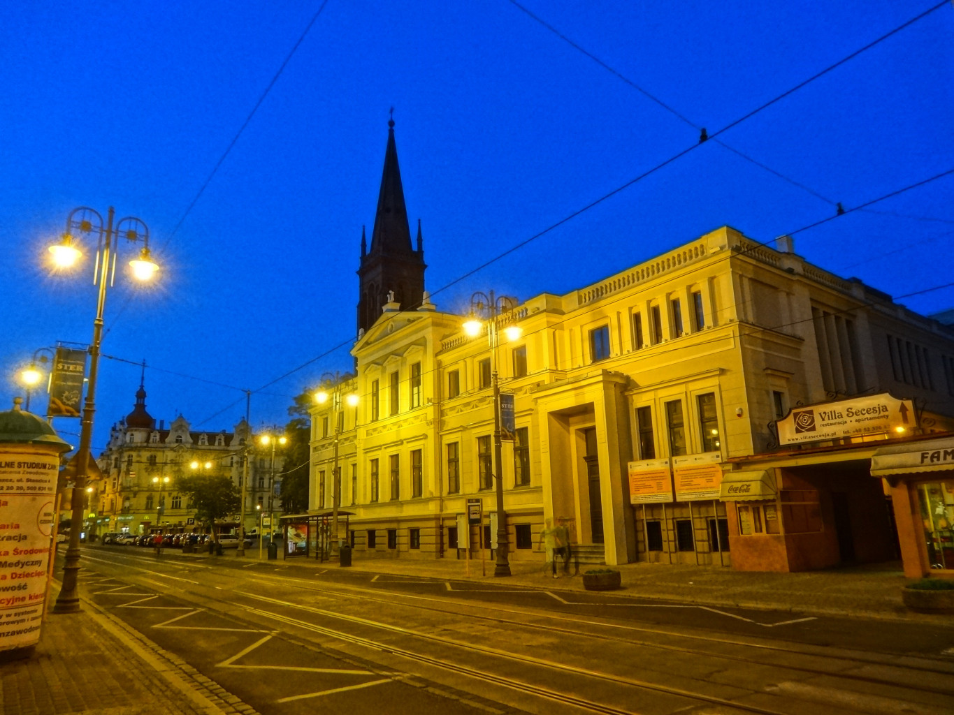 Ulica Gdańska w Bydgoszczy